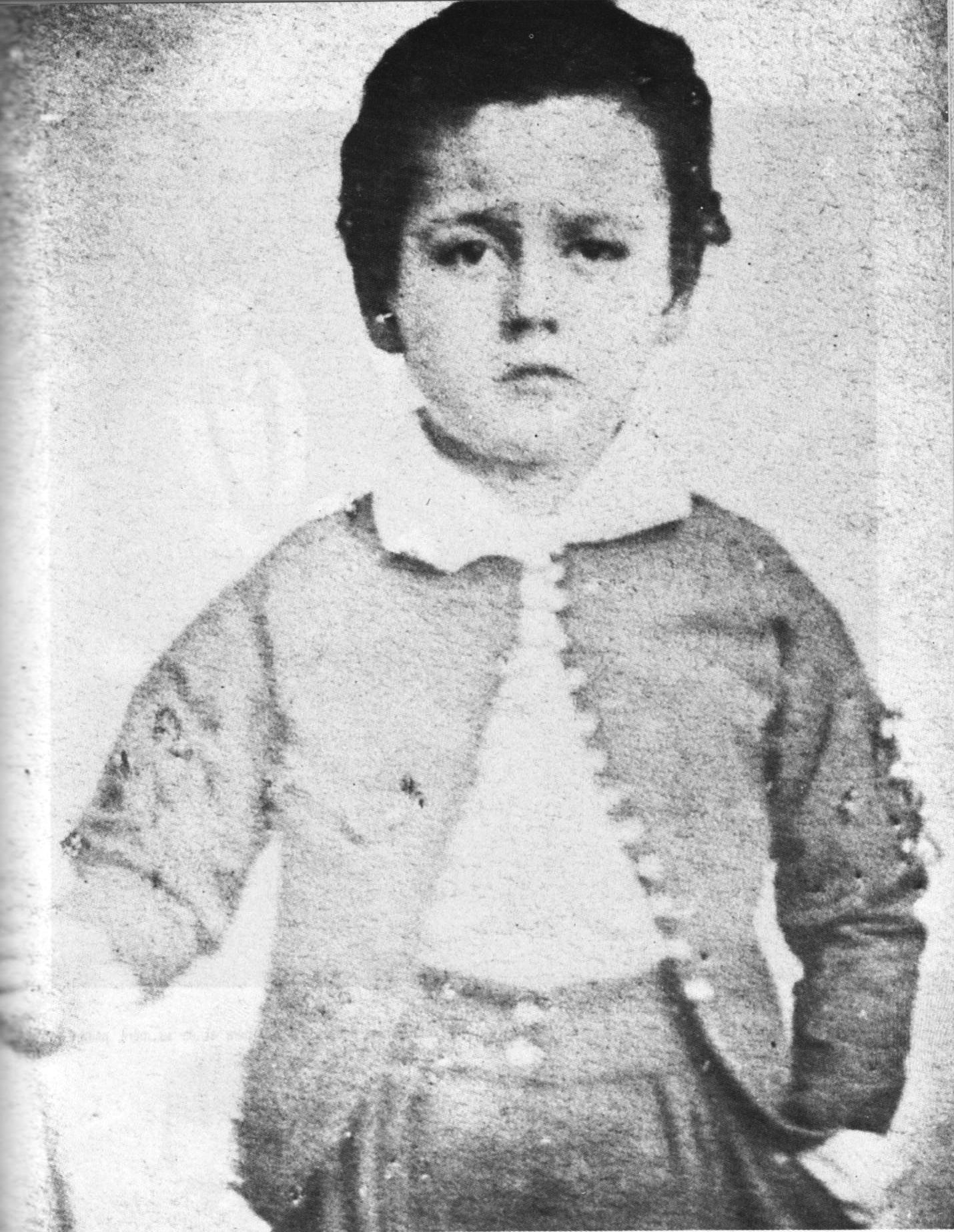 Emile Zola à six ans, 1846